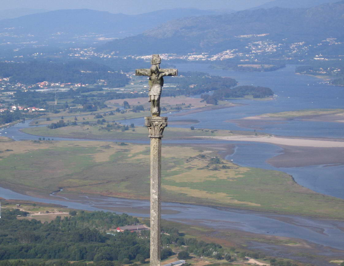 Desembocadura do Río Miño dende a ladeira do Monte de Santa Tegra.